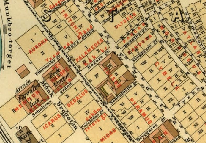 Del av Lundgrens karta över Stockholm år 1885